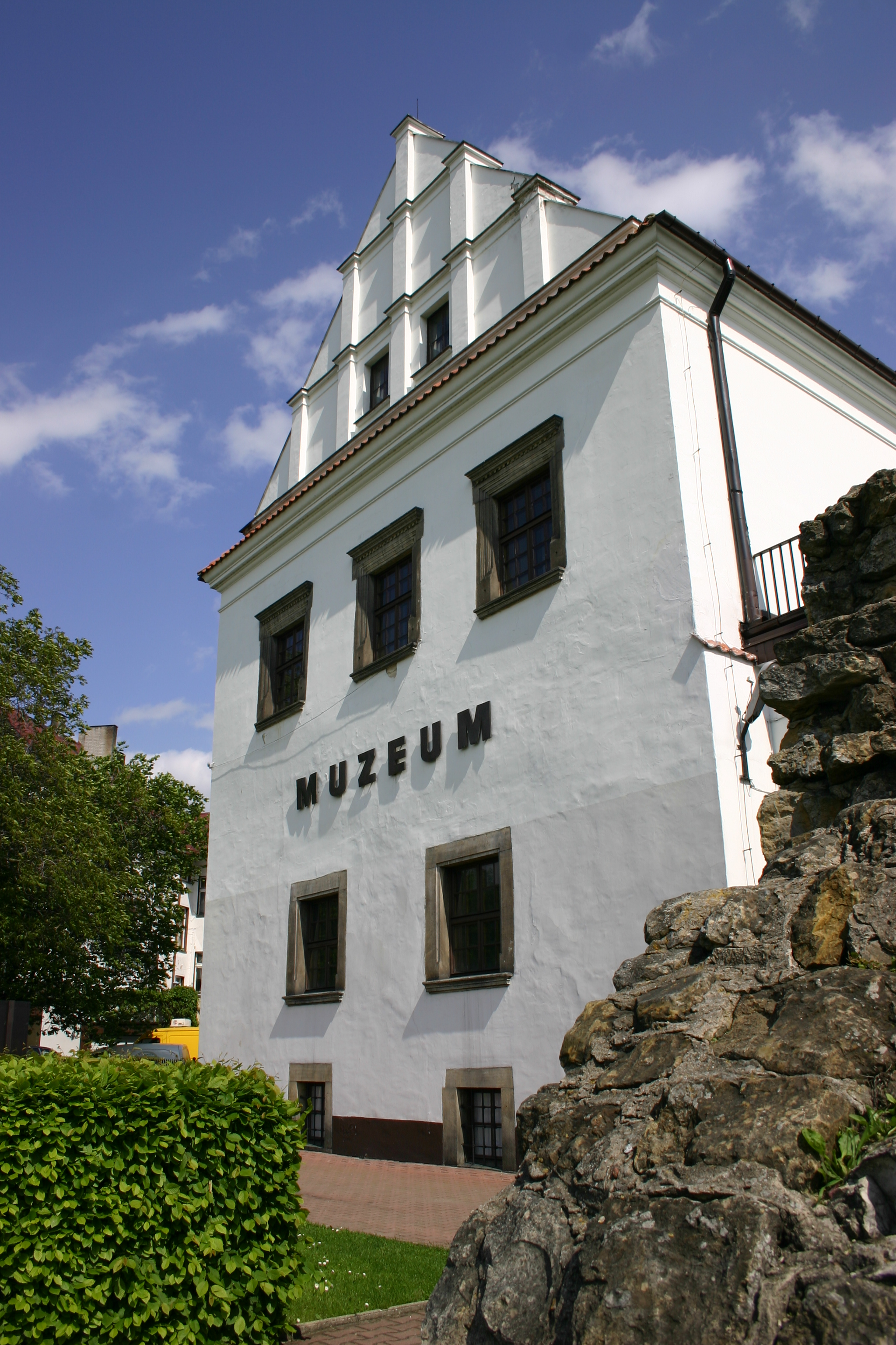 Wieluń - klasztor, ob. Muzeum Ziemi Wieluńskiej, w zespole klasztornym bernardynek (zabytek nr rejestr. 182/970)